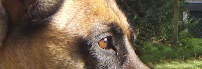 eigen foto steffen heinz (caronna)